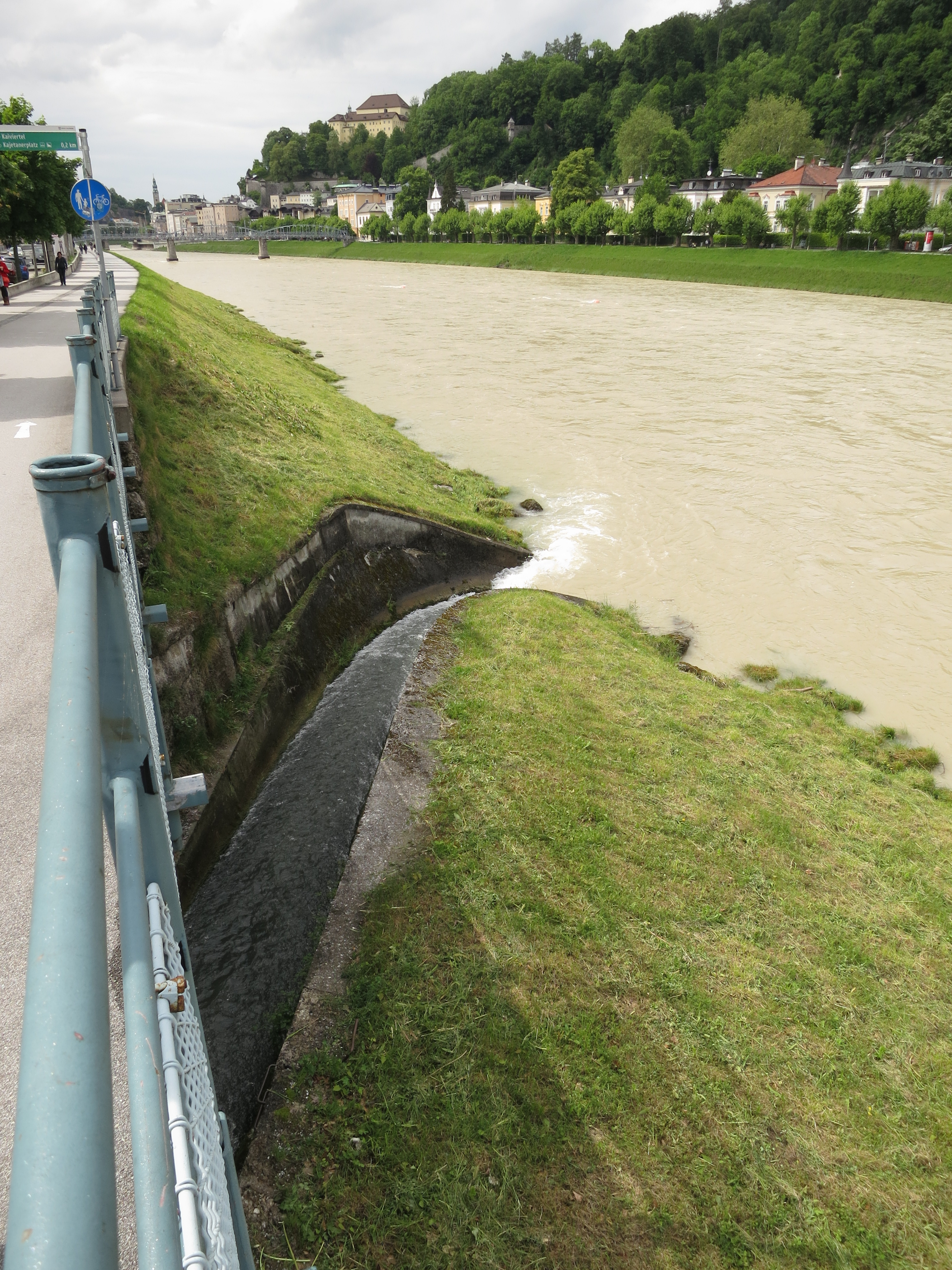 Mündung des Nonntalarms des Stiftsarmsystems des Almkanals in die Salzach